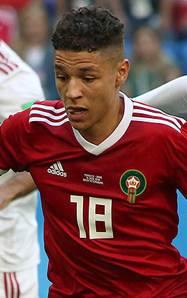 Автогол сборной Марокко принес победу Ирану